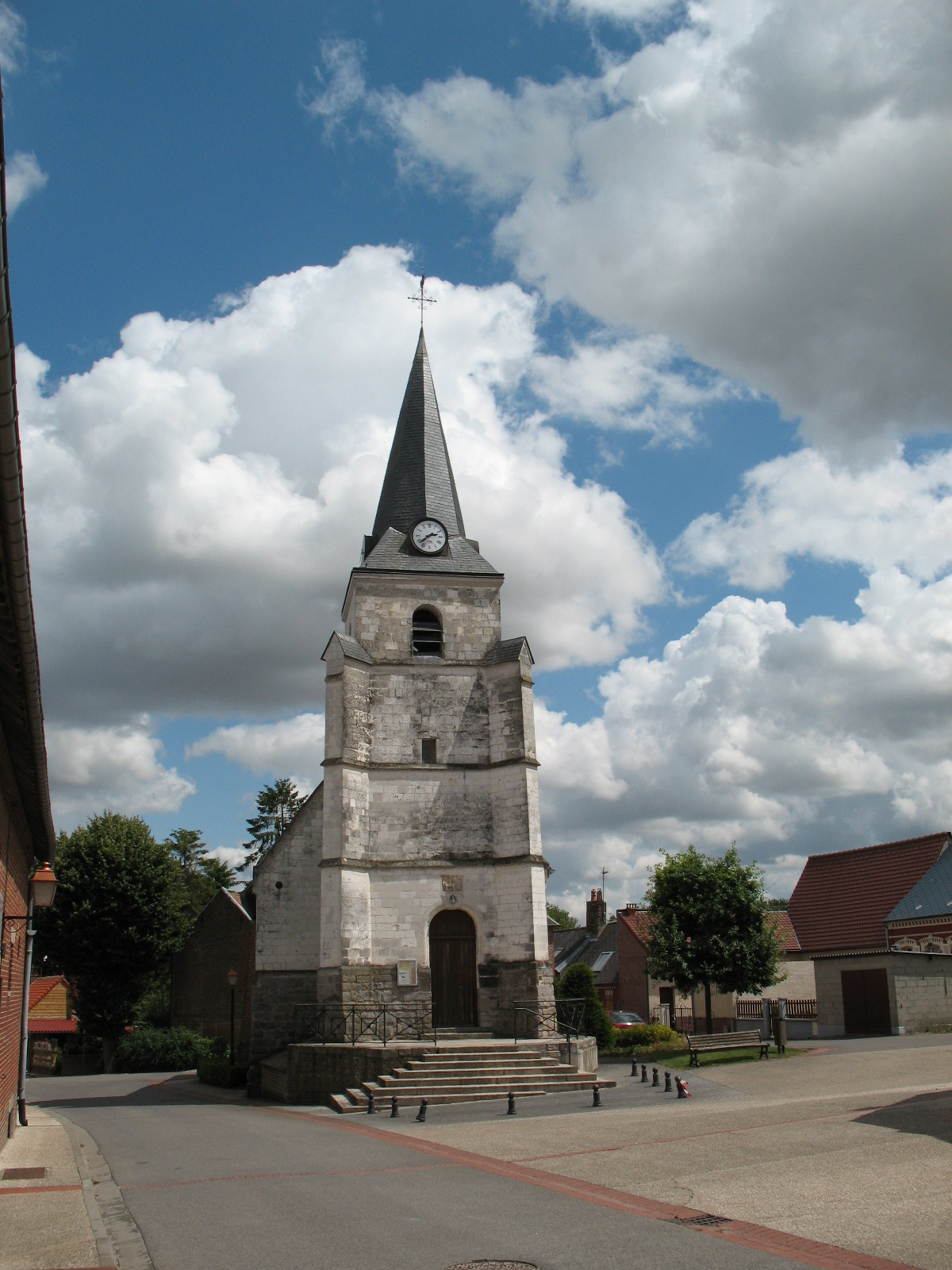 Portail et clocher de l'église de Vecquemont.